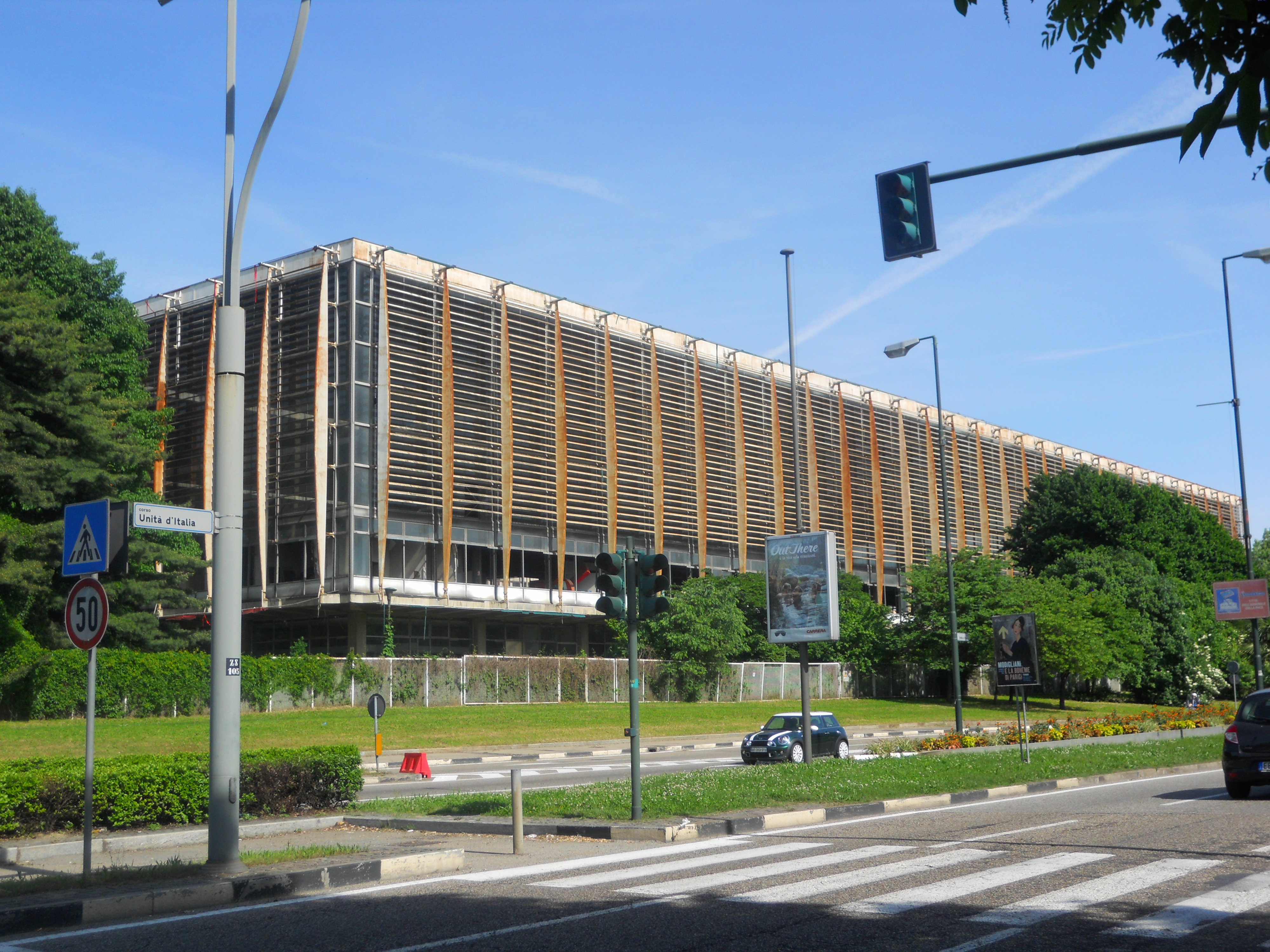 Palazzo del Lavoro - anno 2015